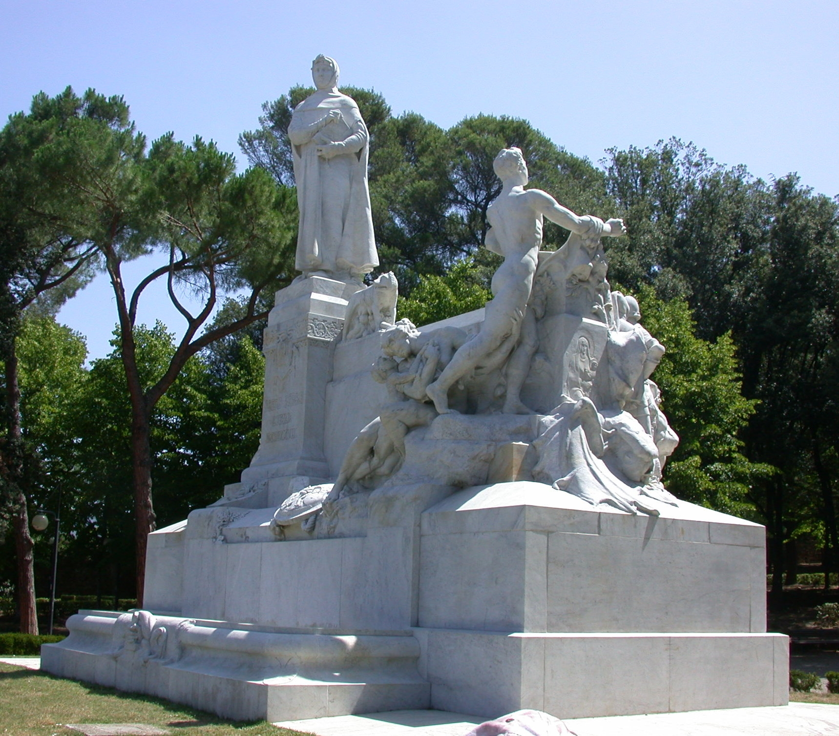 Il monumento a Francesco Petrarca ad Arezzo